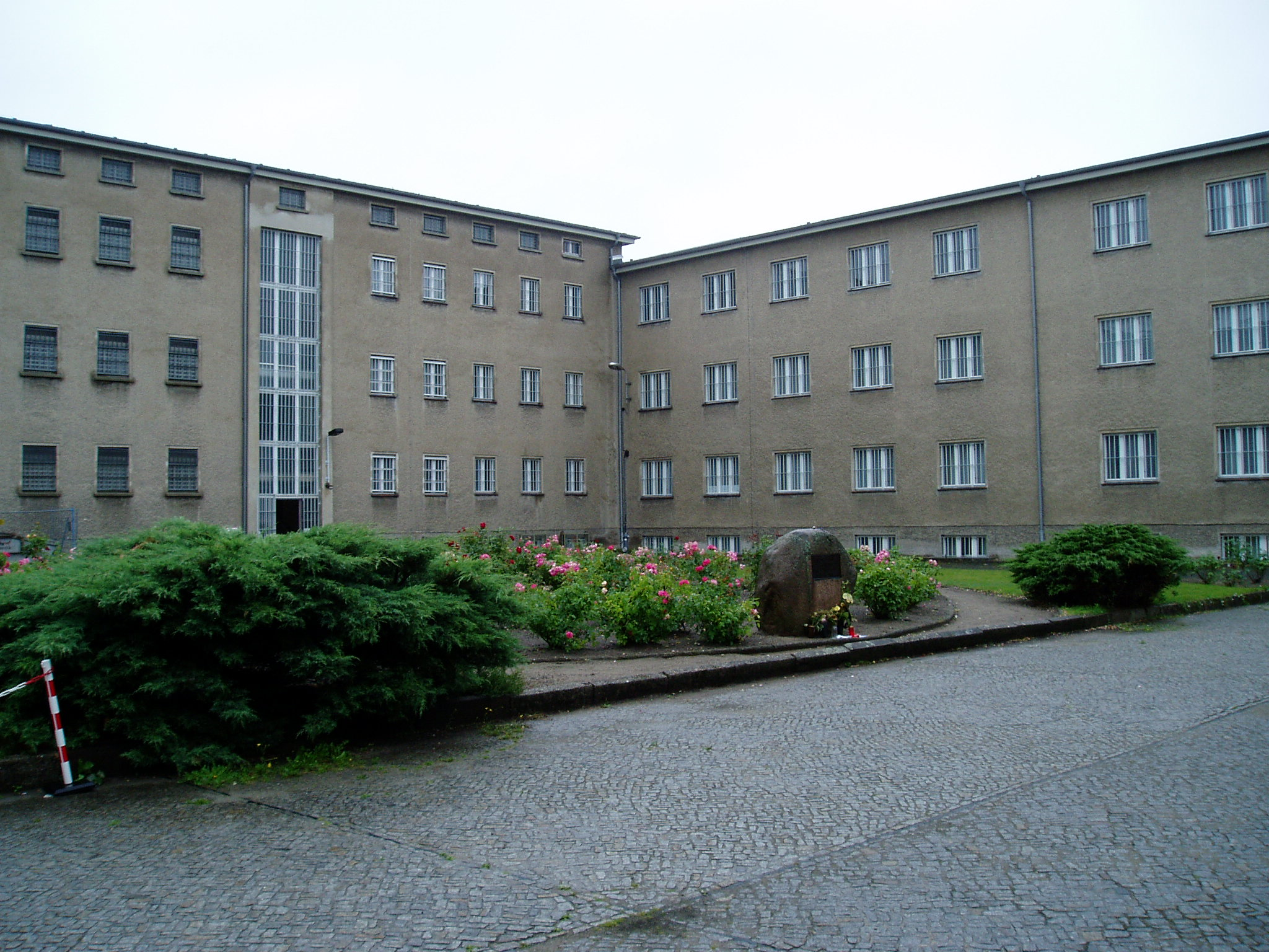 Stasi-Gedenkstätte Berlin-Hohenschönhausen